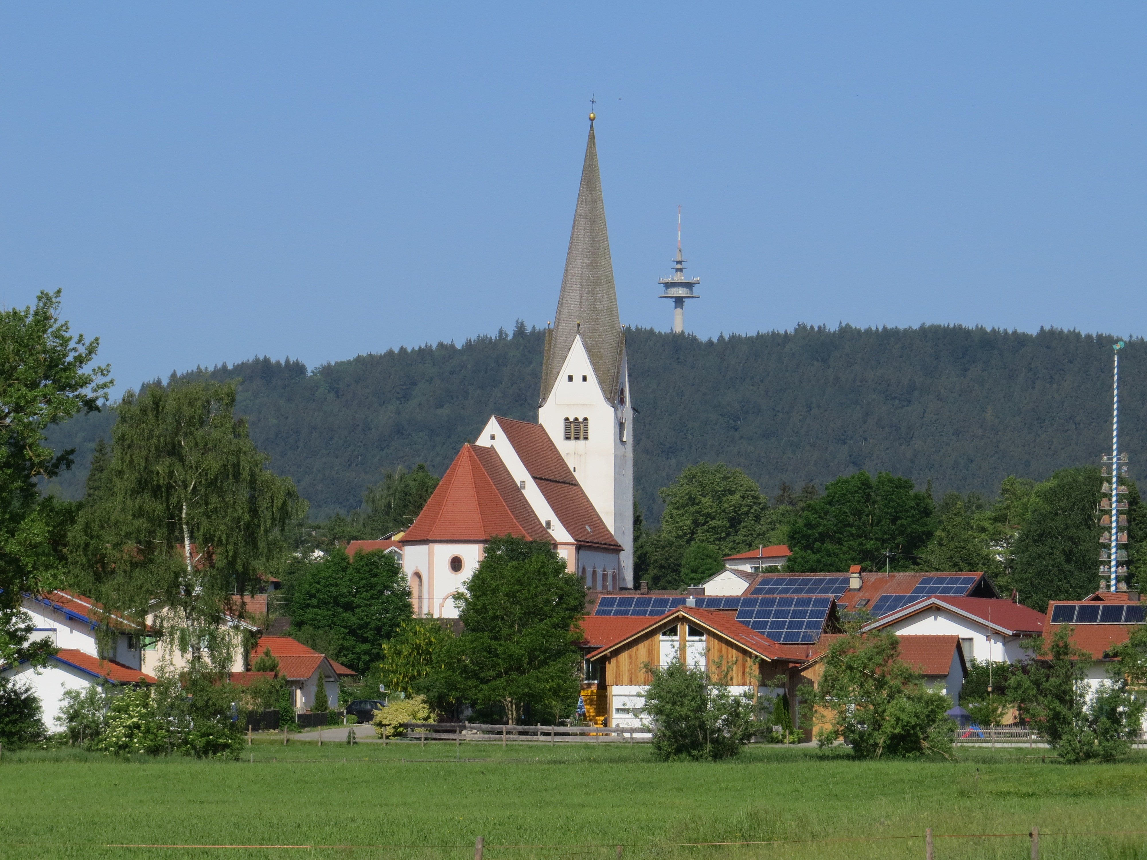 Burggen mit dem Weichberg im Hintergrund